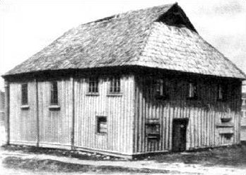 Беларуская (тарашкевіца): Адэльск (Adelsk). Сынагога